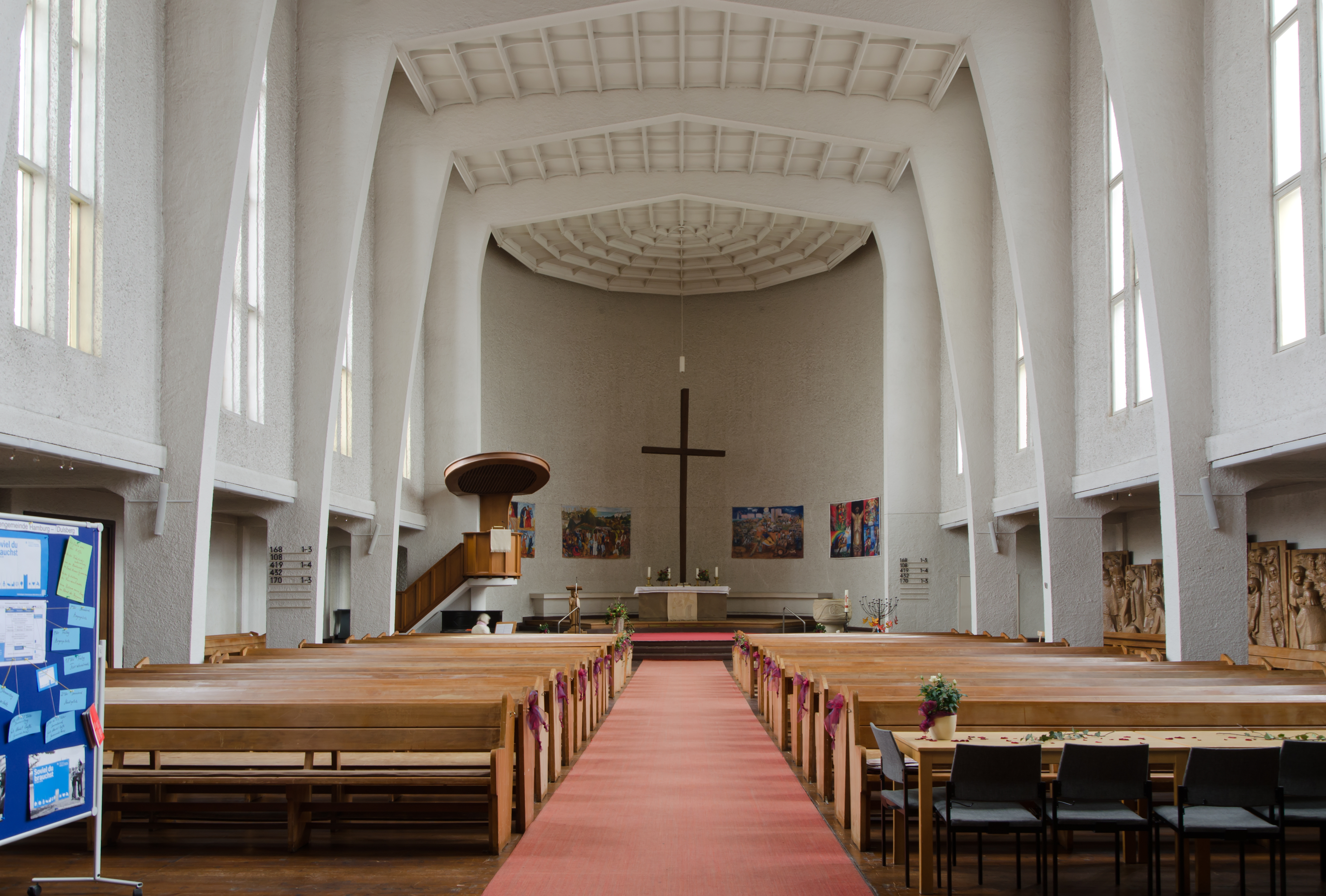 Frohebotschaftskirche HH Dulsberg